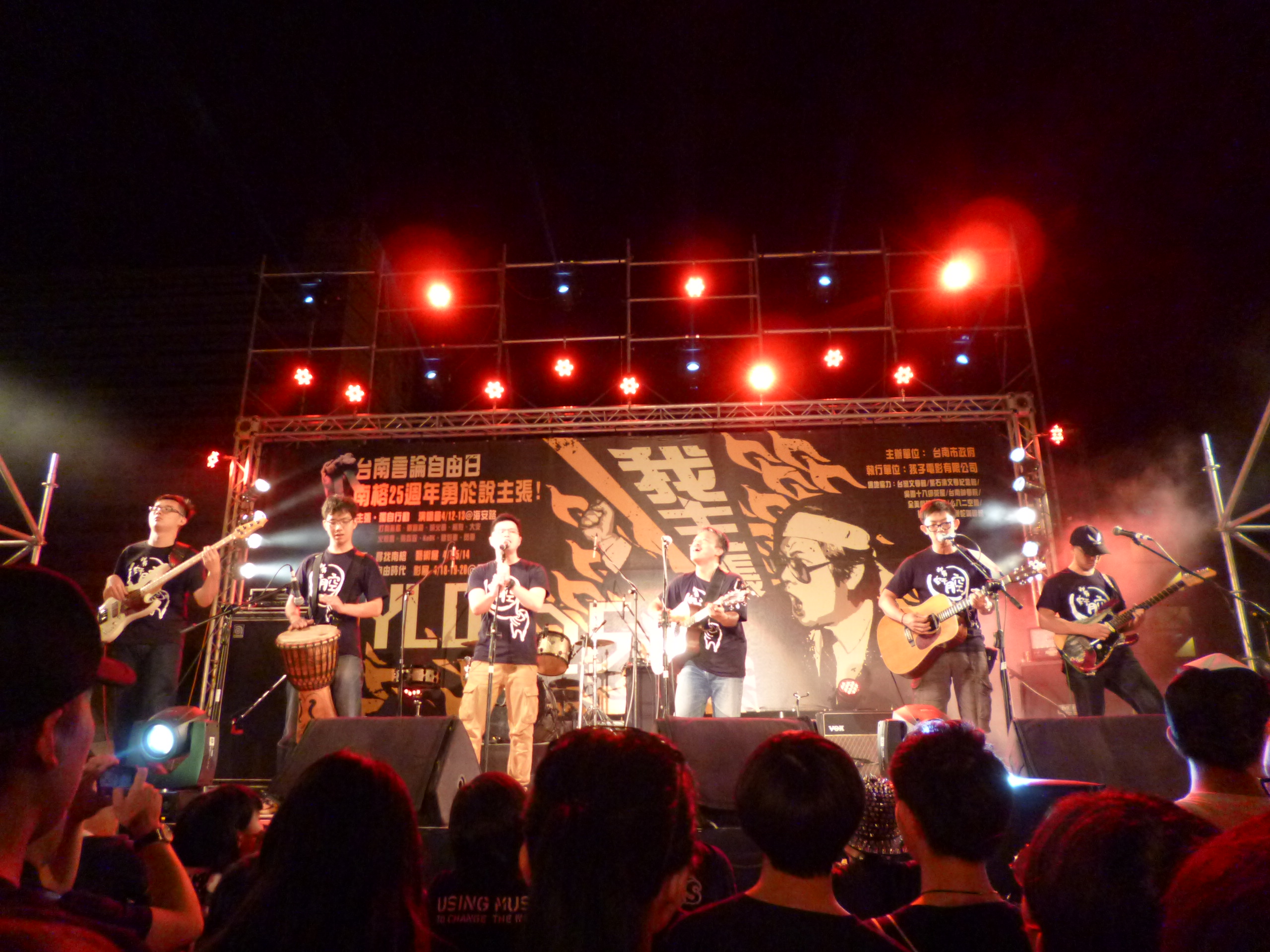 2014年4月的麵包車編制，參與臺南市政府主辦「台南言論自由日」表演。